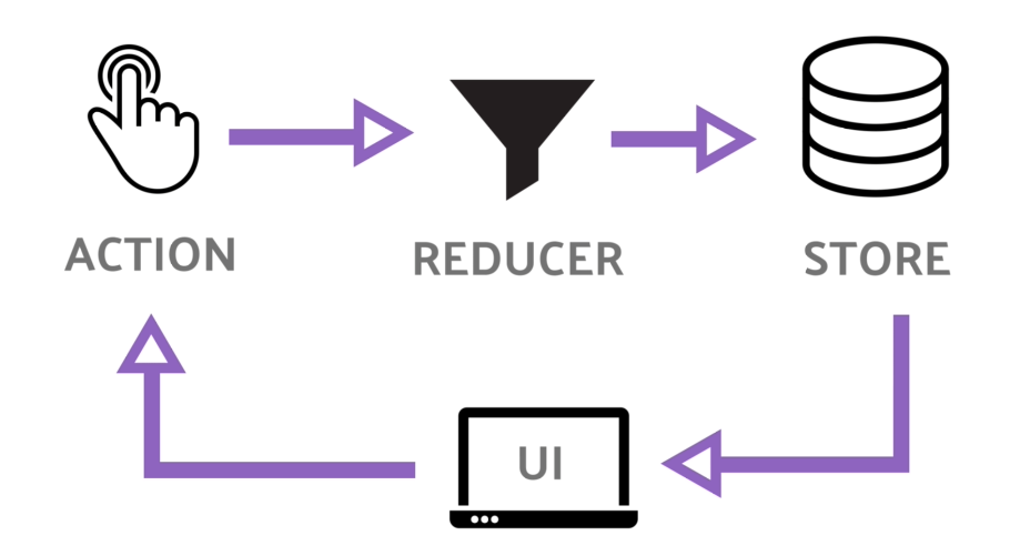 Redux